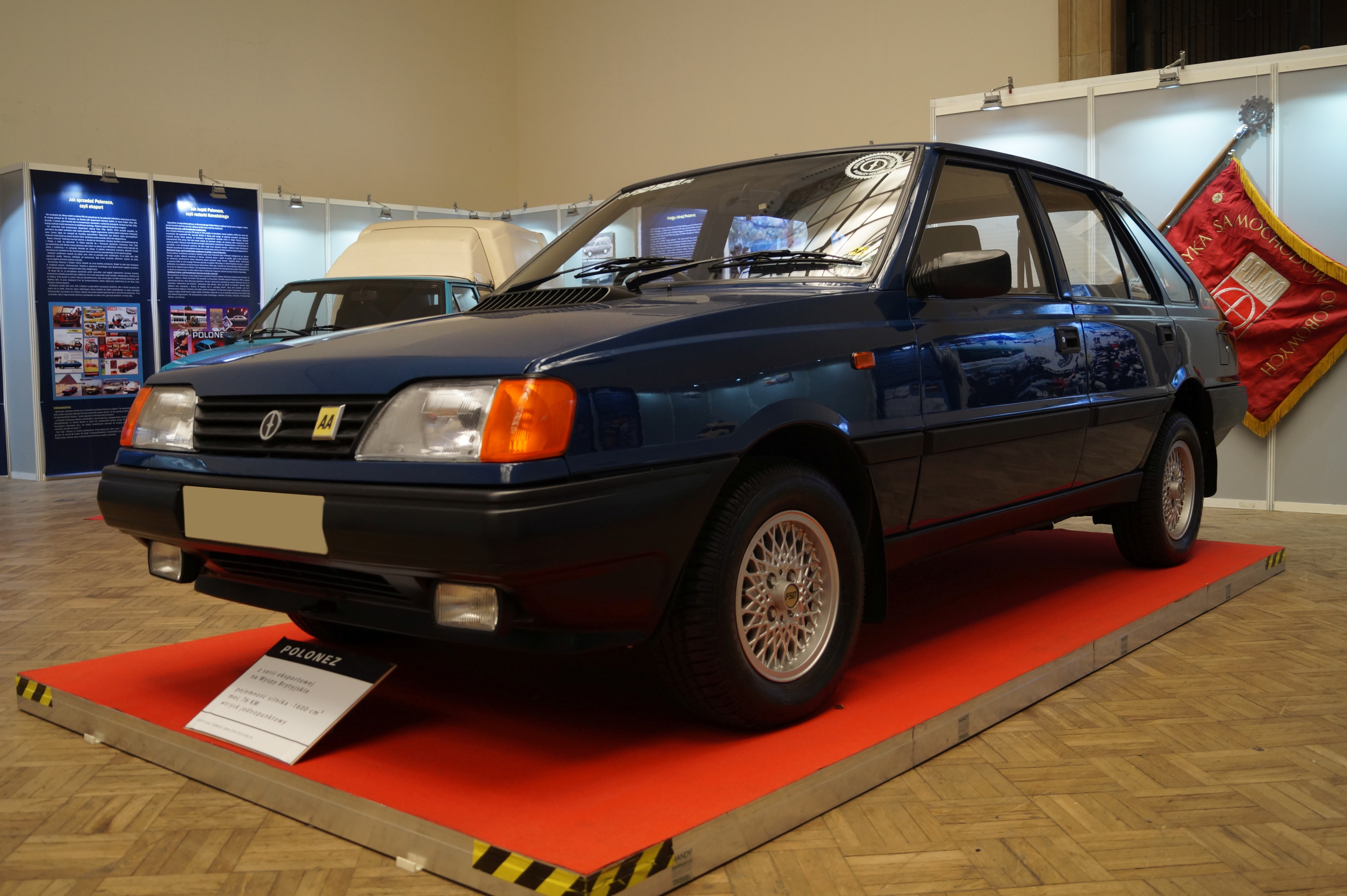 This photo was taken during Automotive Wikiexpedition 2016 set up by Wikimedia Polska Association.You can see all photographs in category Wikiekspedycja motoryzacyjna 2016. English | Polski | +/− Przód FSO Polonez Caro 1.5 GLI na rynek brytyjski w Muzeum Nauki i Techniki w Warszawie